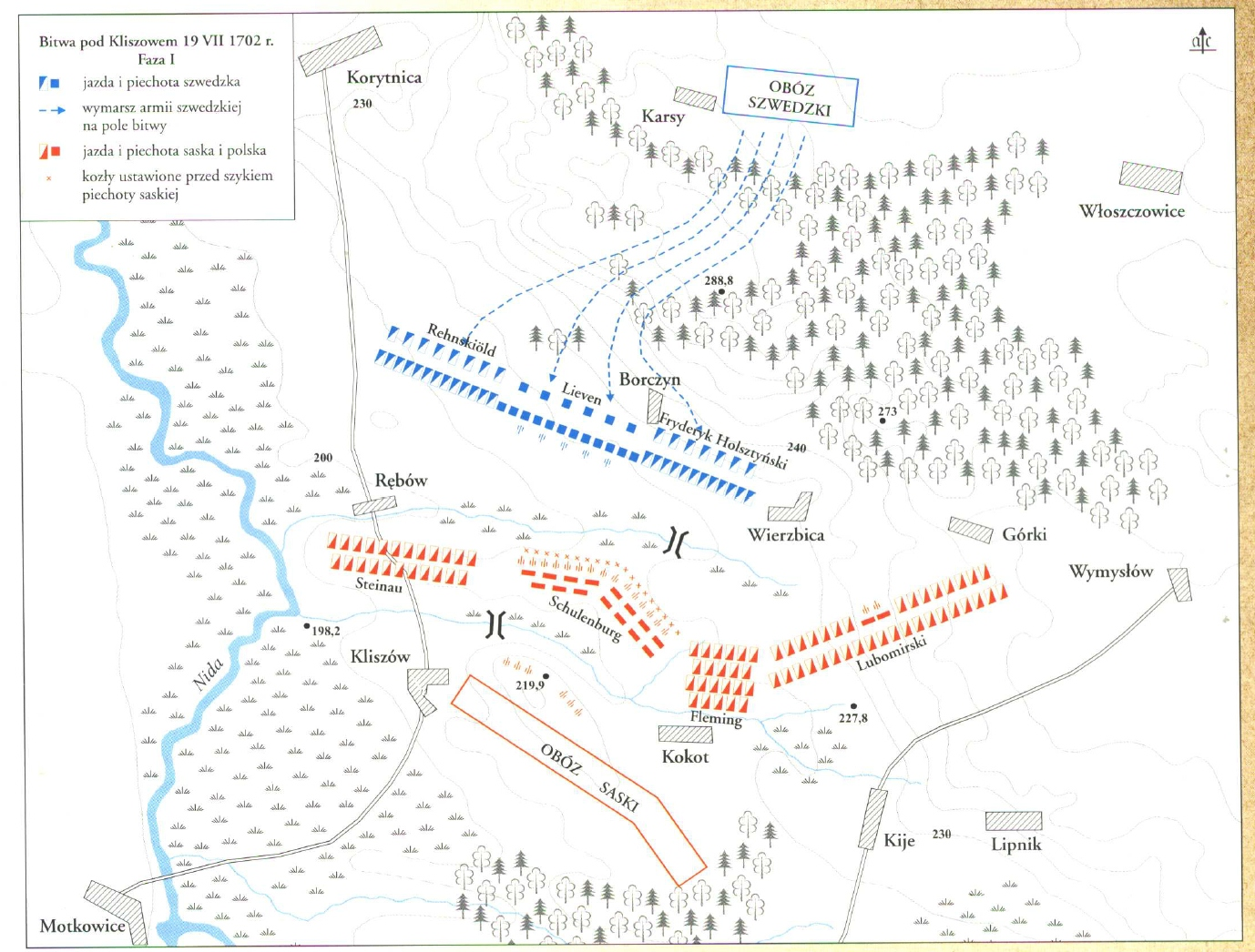 Slaget vid Kliszów 1702